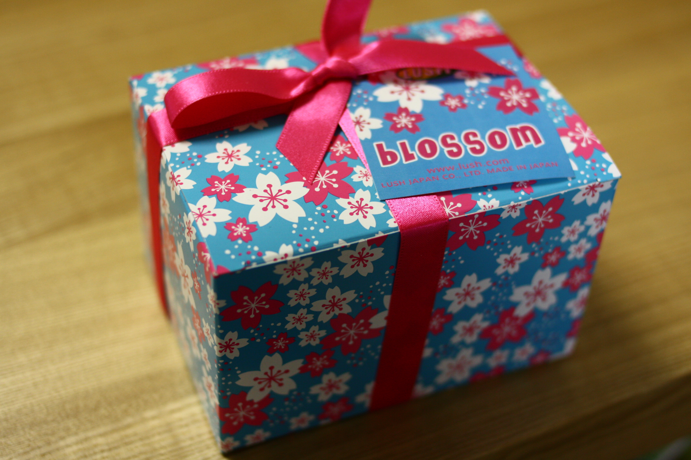 LUSHのバスボム